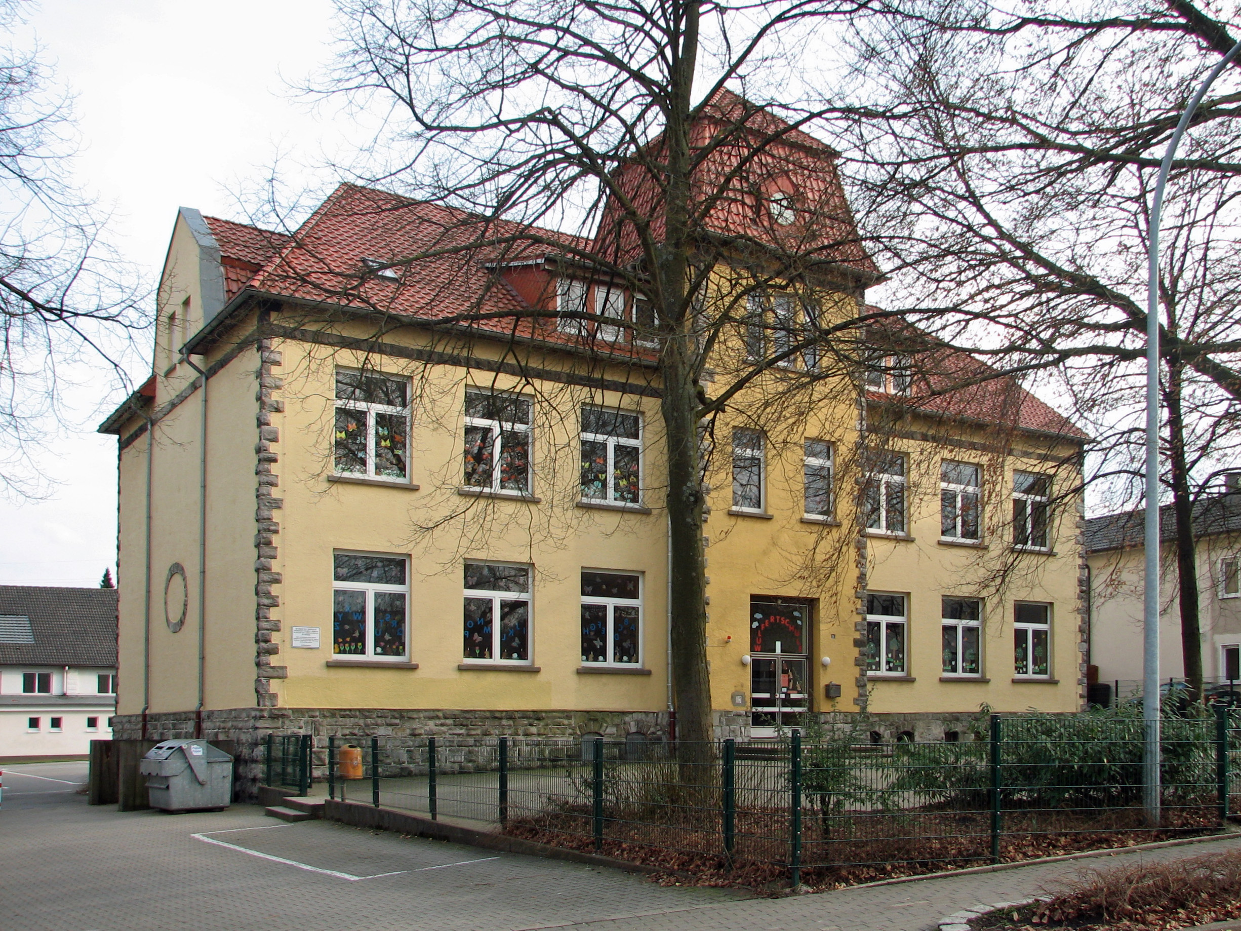 Wulfert-Grundschule in Hemer, Deutschland